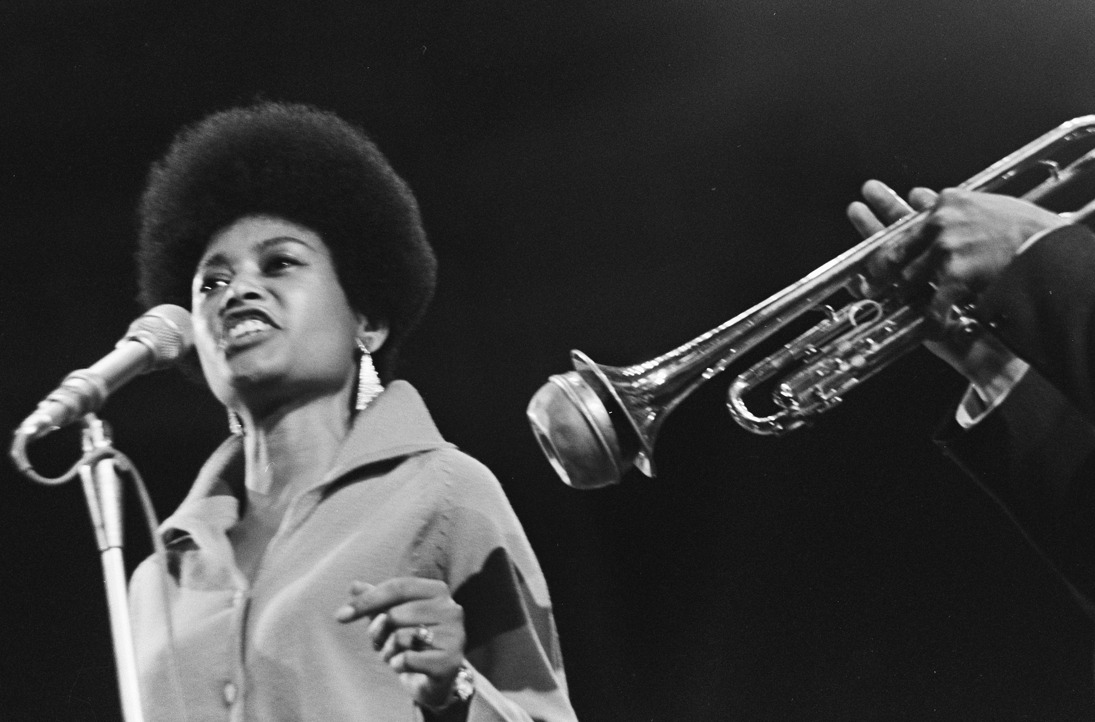 Collectie / Archief : Fotocollectie Anefo Reportage / Serie : [ onbekend ] Beschrijving : Opdracht Parool, Abbey Lincoln (jazz-zangeres) Datum : 13 juli 1966 Trefwoorden : Jazz Persoonsnaam : Abbey Lincoln Instellingsnaam : Parool, Het Fotograaf : Nijs, Jac. de / Anefo Auteursrechthebbende : Nationaal Archief Materiaalsoort : Negatief (zwart/wit) Nummer archiefinventaris : bekijk toegang 2.24.01.05 Bestanddeelnummer : 919-3554